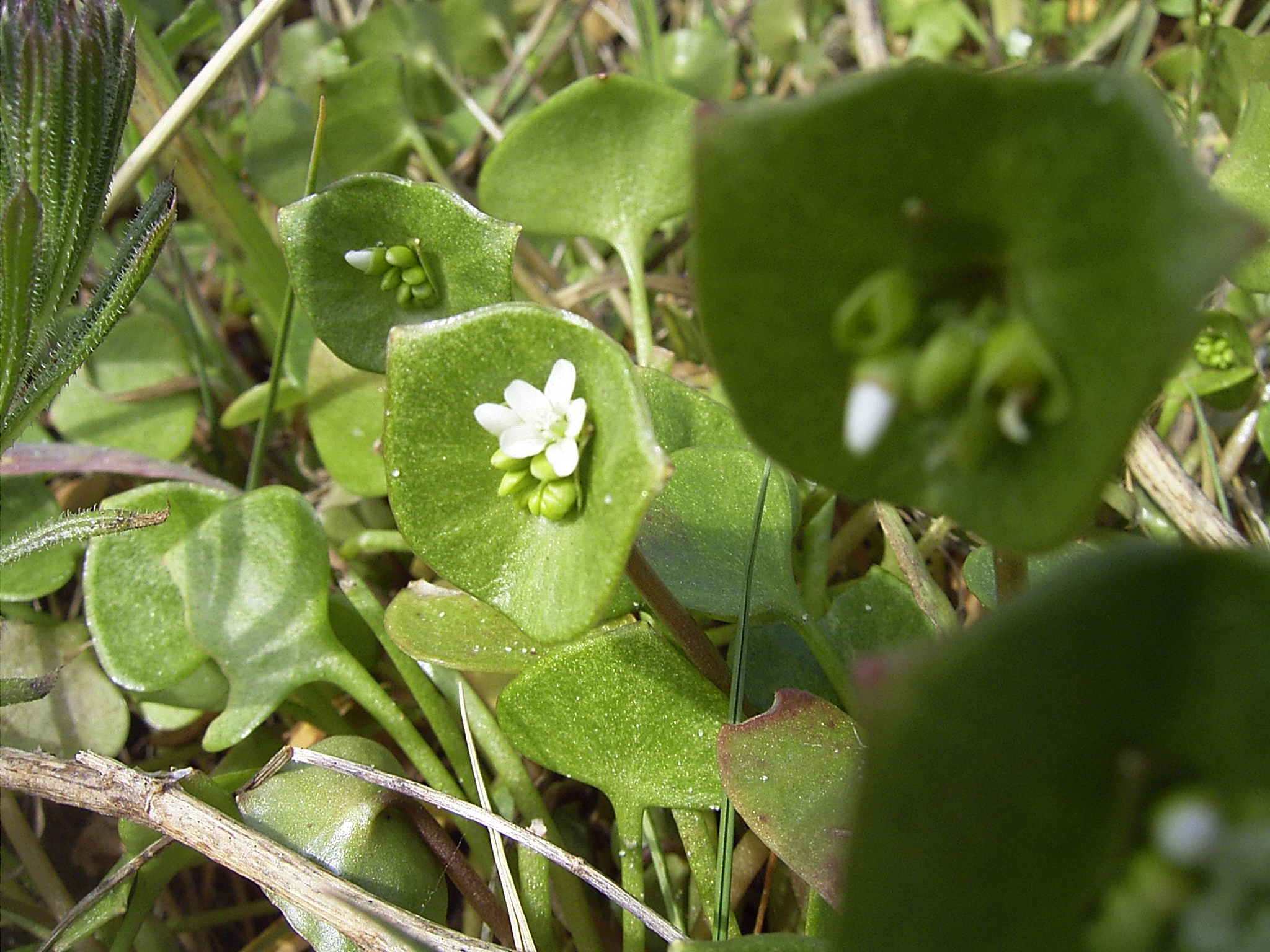 Claytonia perfoliata